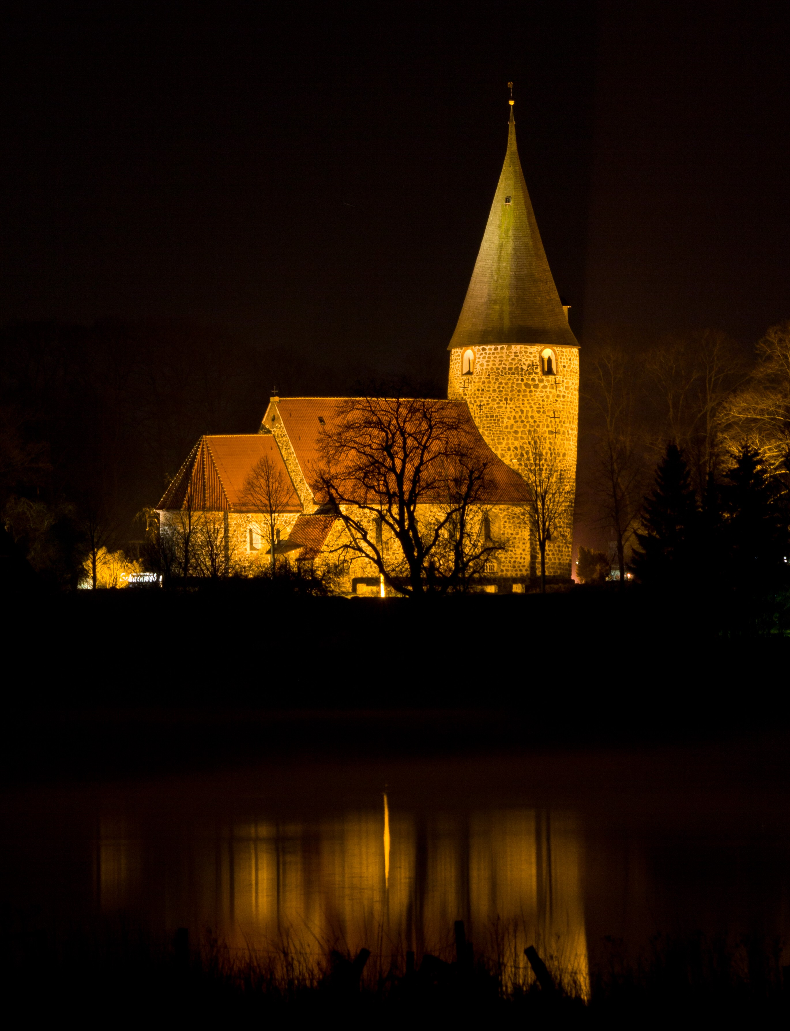 Die Feldsteinkirche in Ratekau bei Nacht